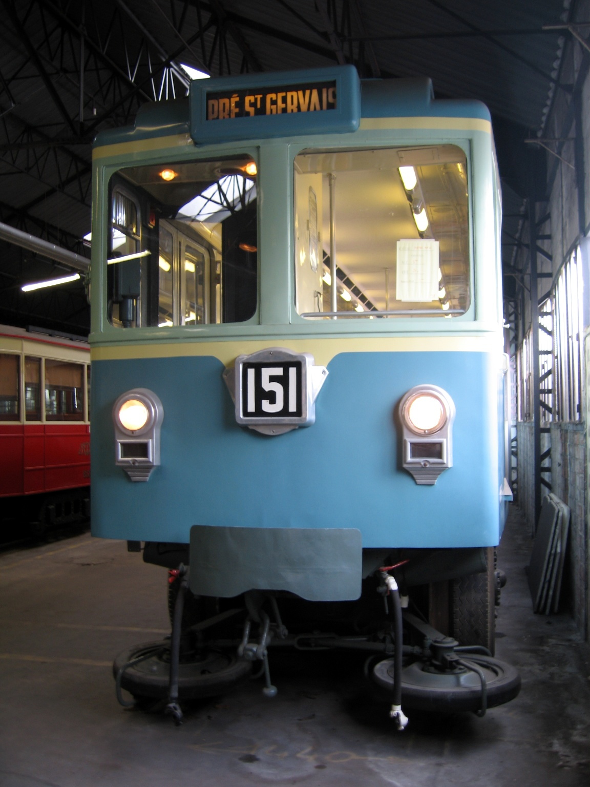 Vue de face du MP 51Journées du patrimoine AMTUIR 15/09/2007.